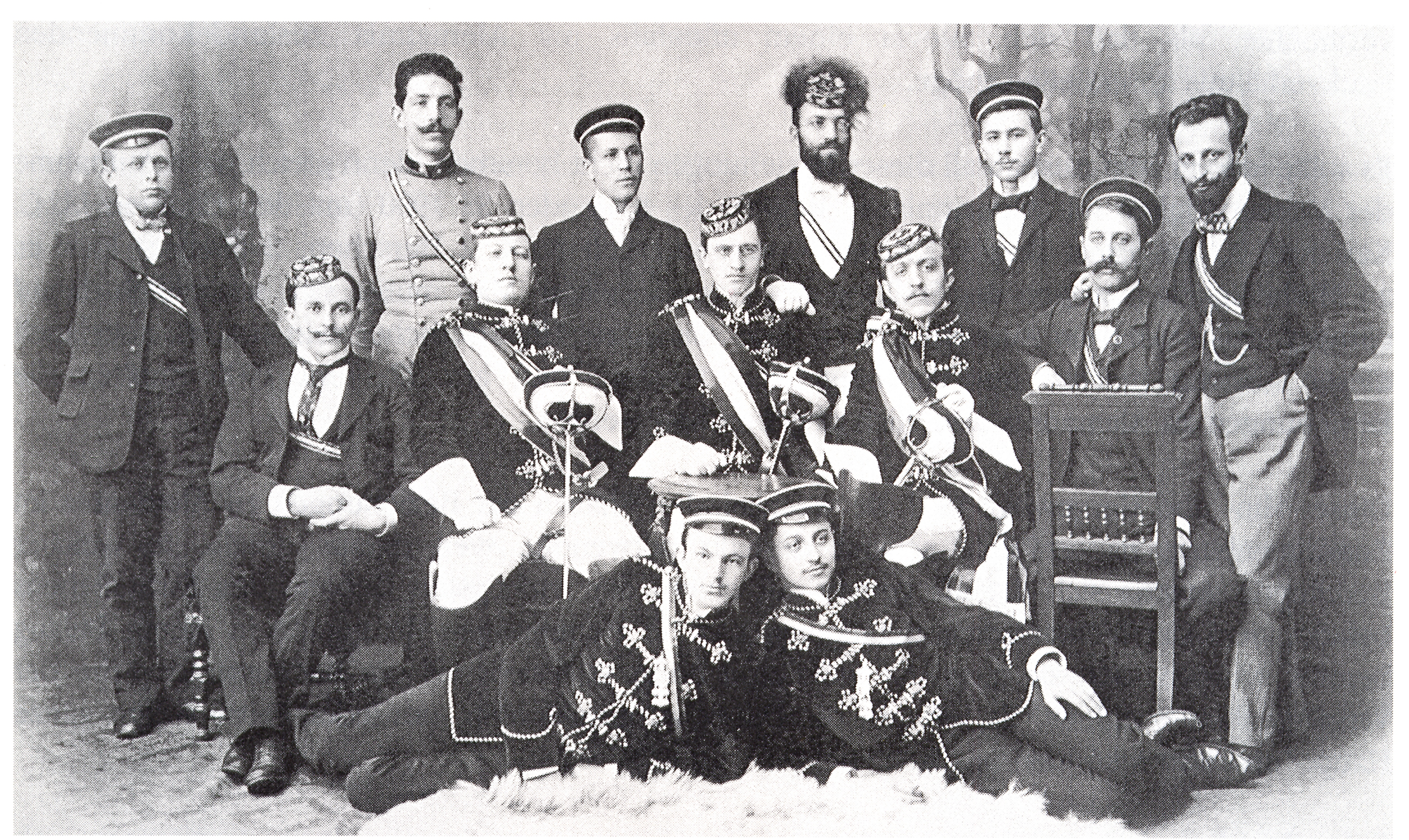 Mitglieder des Corps Austria Prag